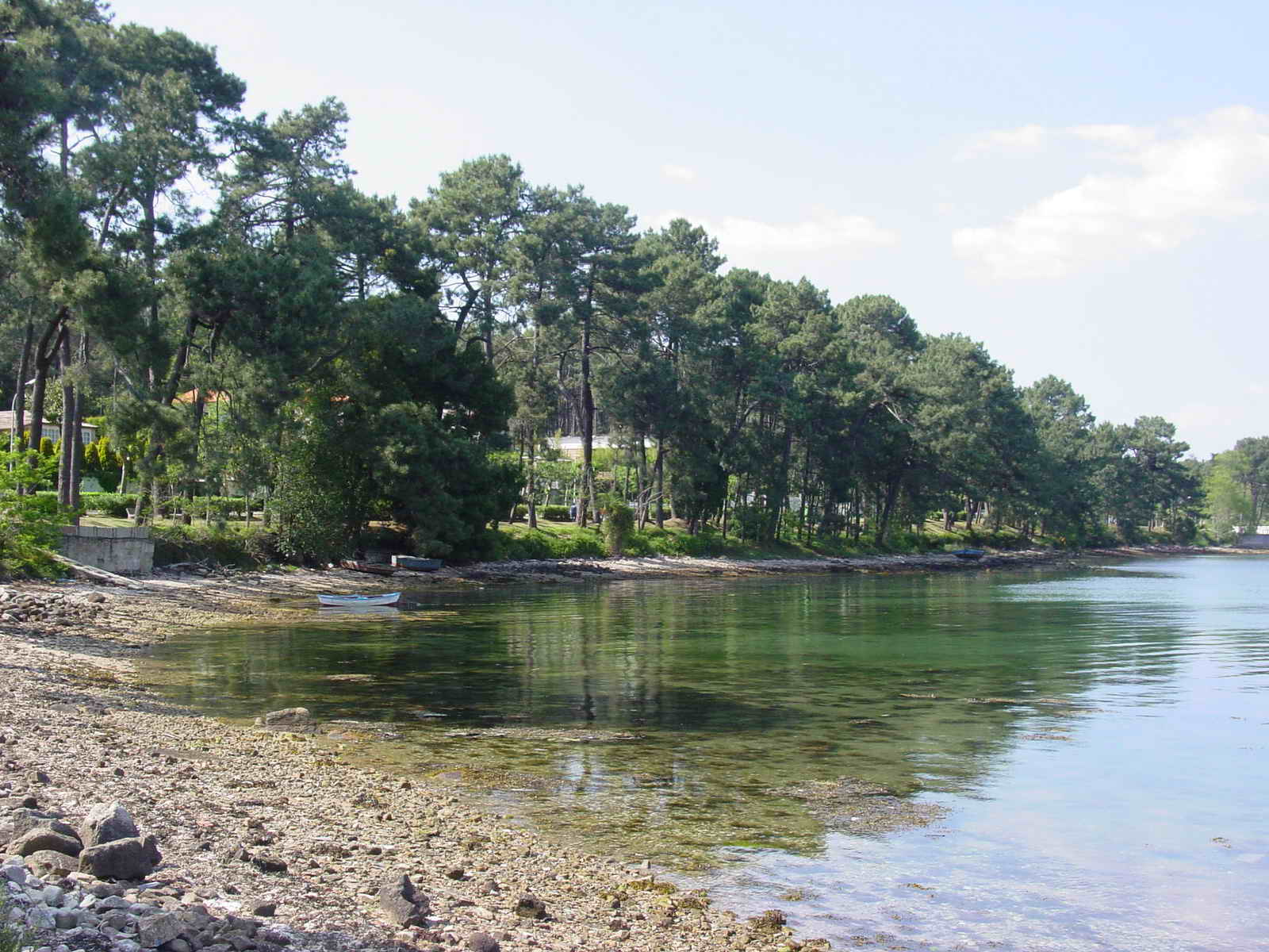 Foto tirada cunha Nikon E8800. Lugar da illa d'A Toxa